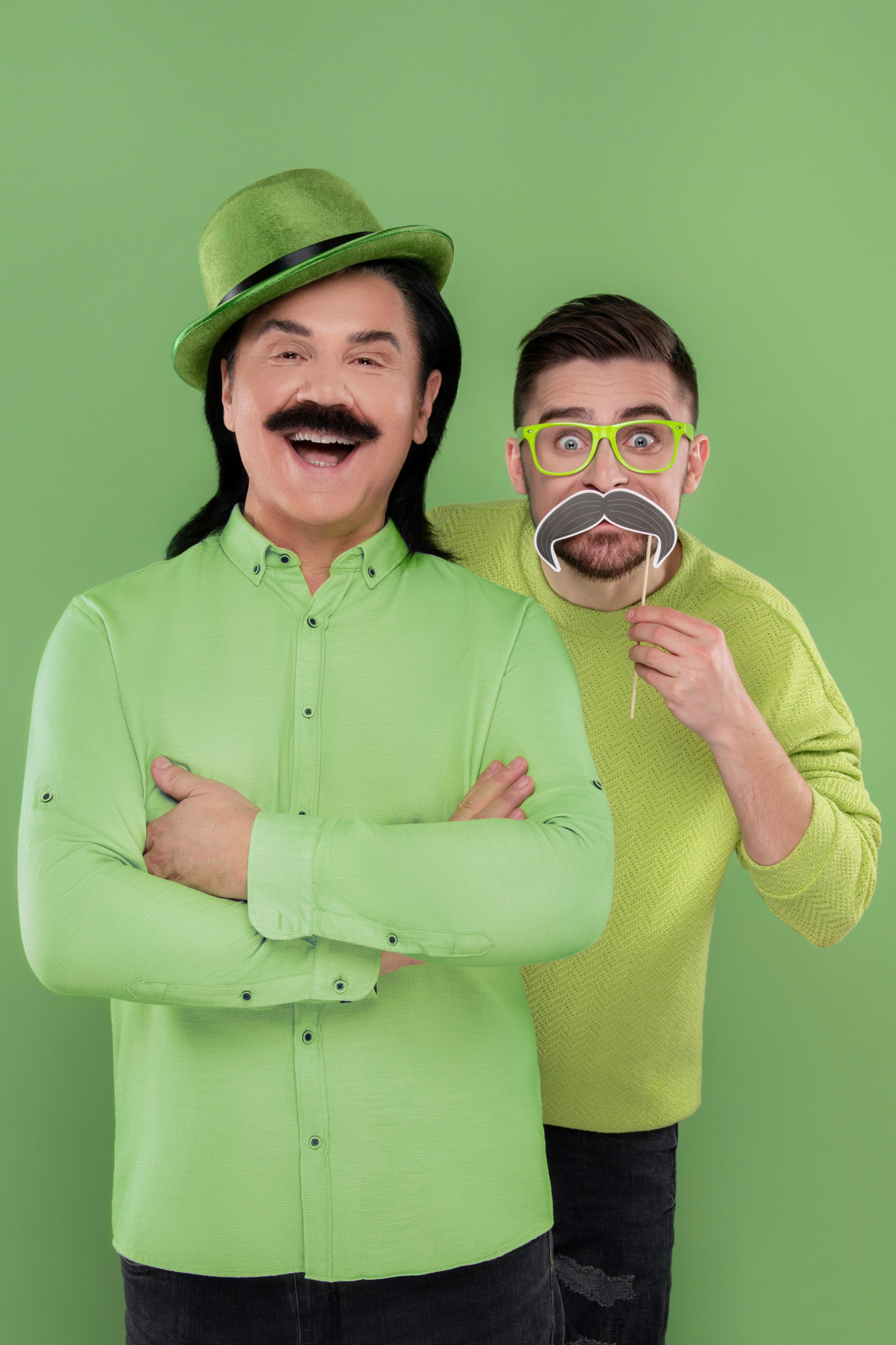 Павел Зибров и JULIK